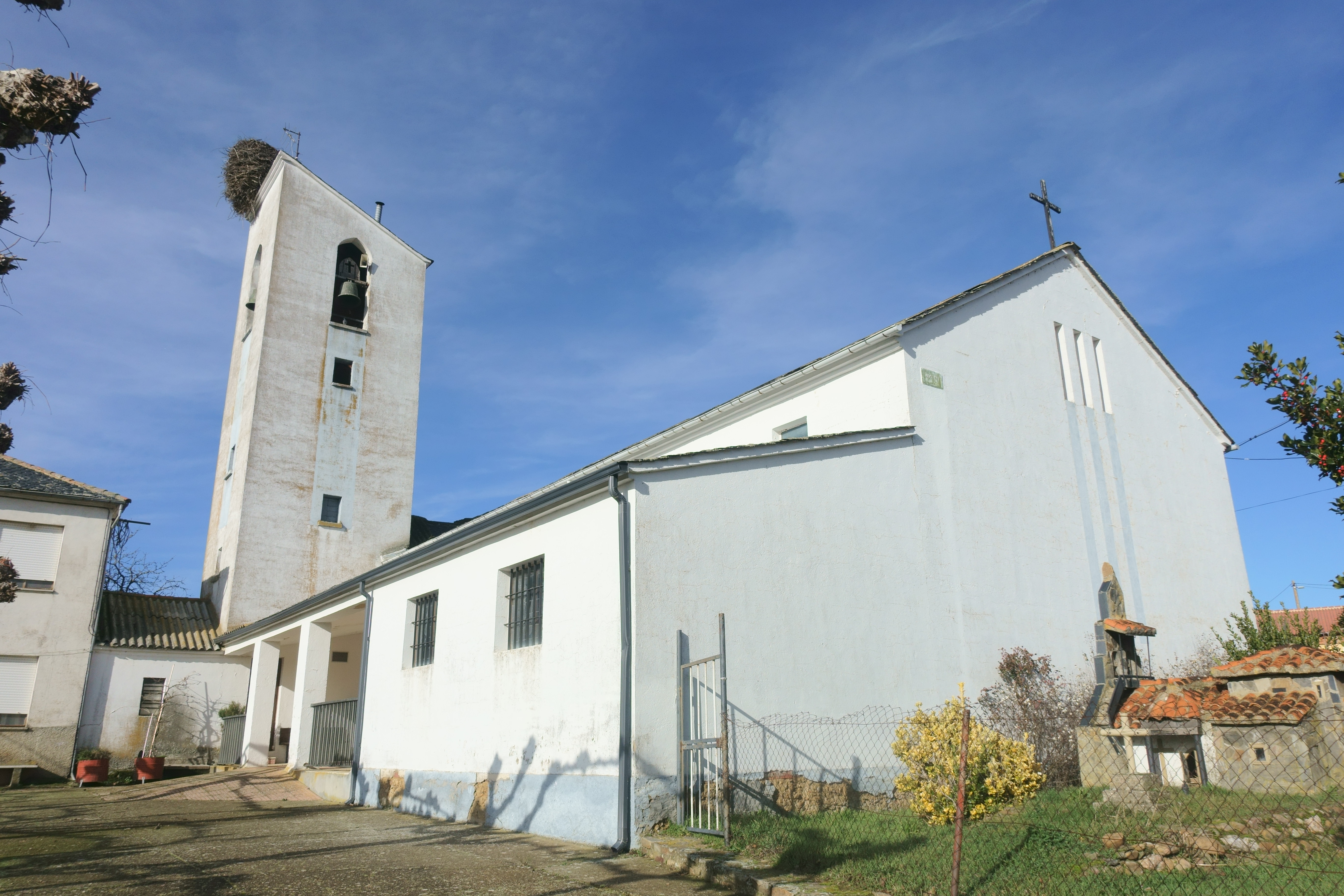 Iglesia de San Martín, Magaz de Cepeda (León, España).